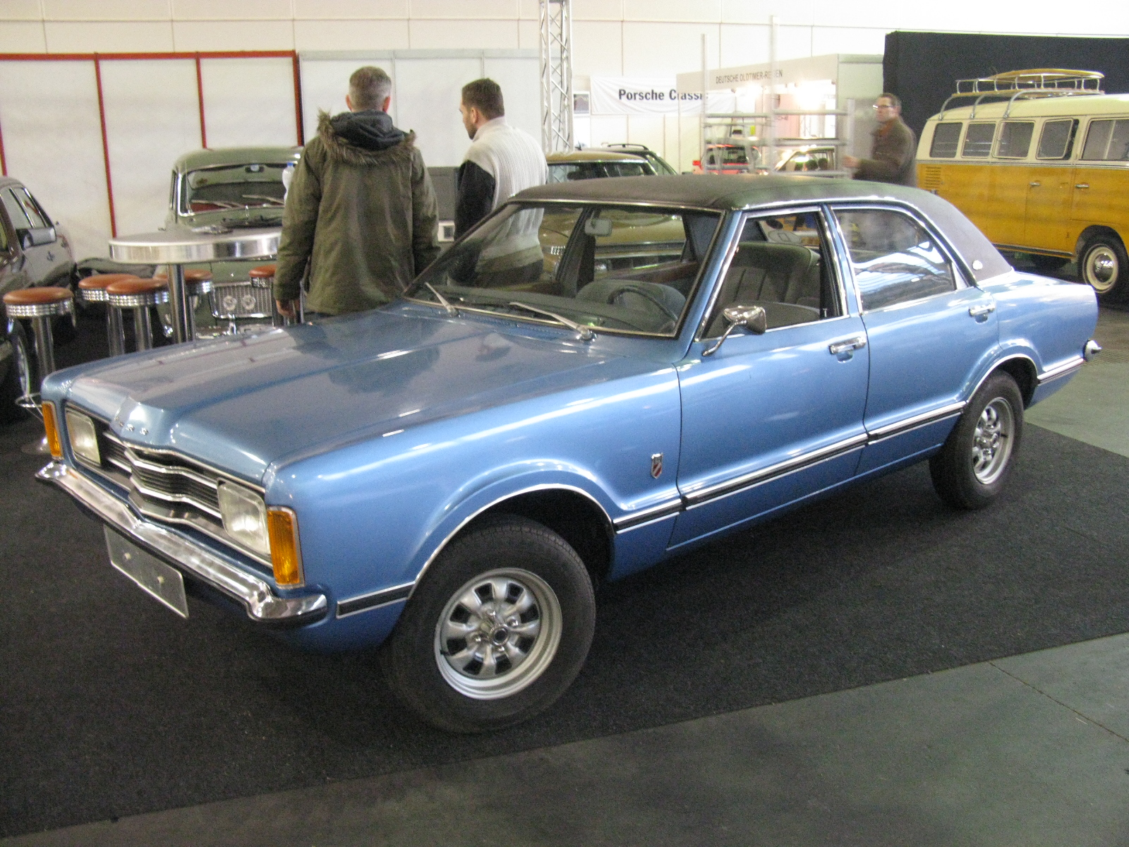 Ford Taunus 1600 GXL